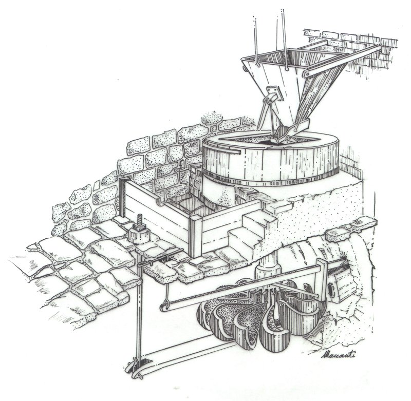 Carlo Maccanti, Spaccato di un mulino. Museo dell'Acqua e del Mulino, Caprese Michelangelo (AR)